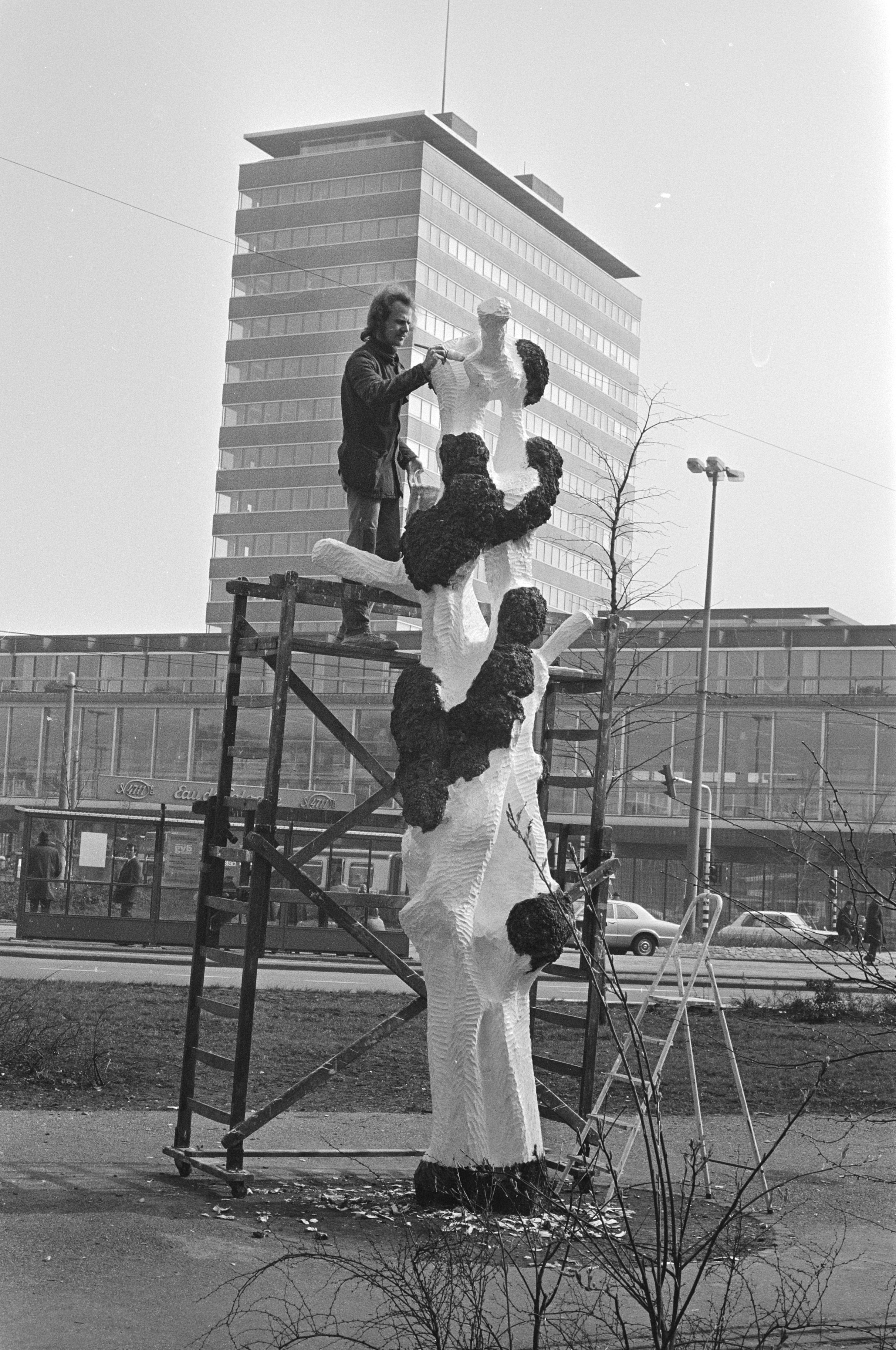 Collectie / Archief : Fotocollectie Anefo Reportage / Serie : Beeldhouwer André van der Linden maakt van een dode boom een kunstwerk op Beschrijving : Van der Linden aan het werk voor het gebouw van de Nederlandsche Bank Annotatie : Het beeld is getiteld: Monument voor een te jong gevallen boom Datum : 8 april 1971 Locatie : Amsterdam, Noord-Holland Trefwoorden : beelden, beeldhouwers, bomen, kunstwerken Persoonsnaam : Linden, André van der Instellingsnaam : Nederlandsche Bank, De Fotograaf : Fotograaf Onbekend / Anefo Auteursrechthebbende : Nationaal Archief Materiaalsoort : Negatief (zwart/wit) Nummer archiefinventaris : bekijk toegang 2.24.01.05 Bestanddeelnummer : 924-4411